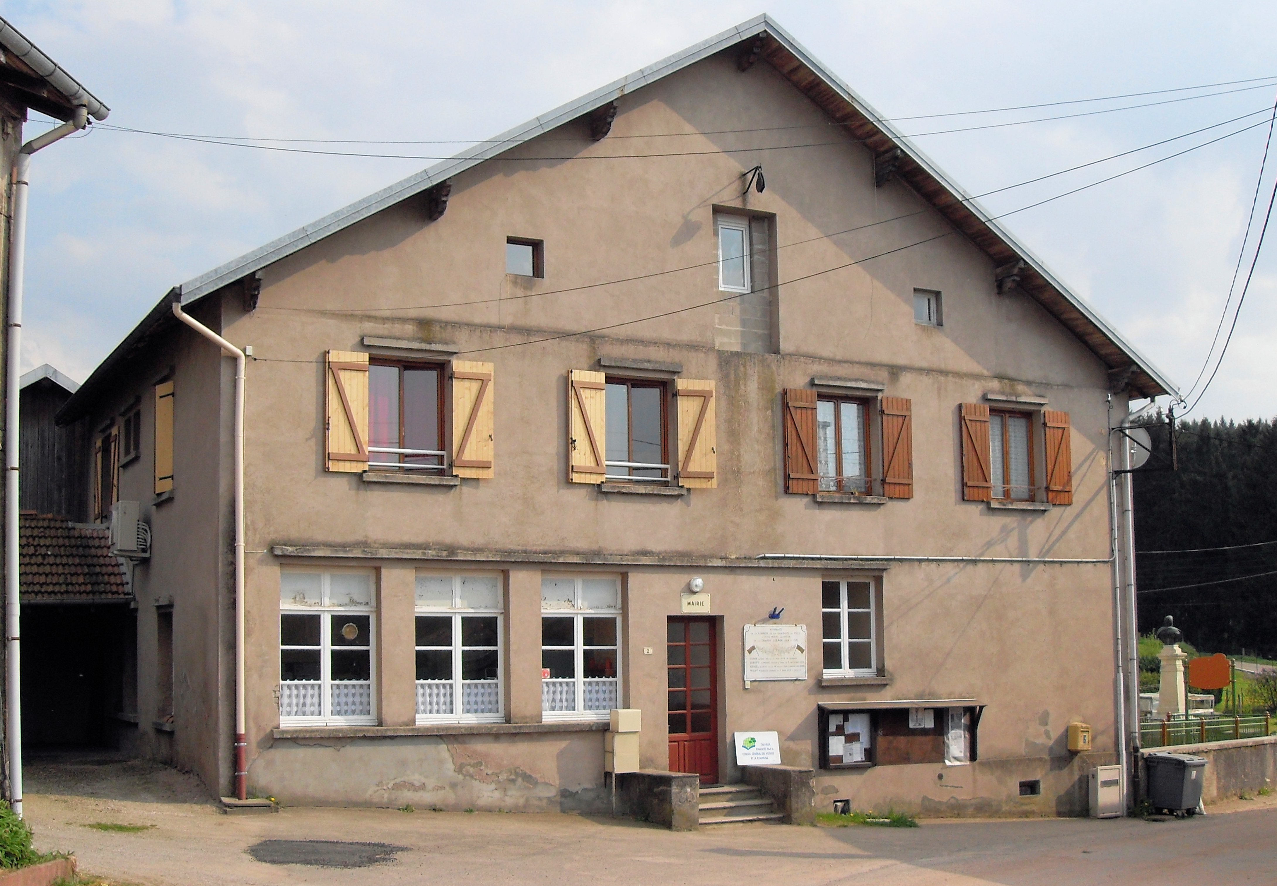 La mairie de Prey